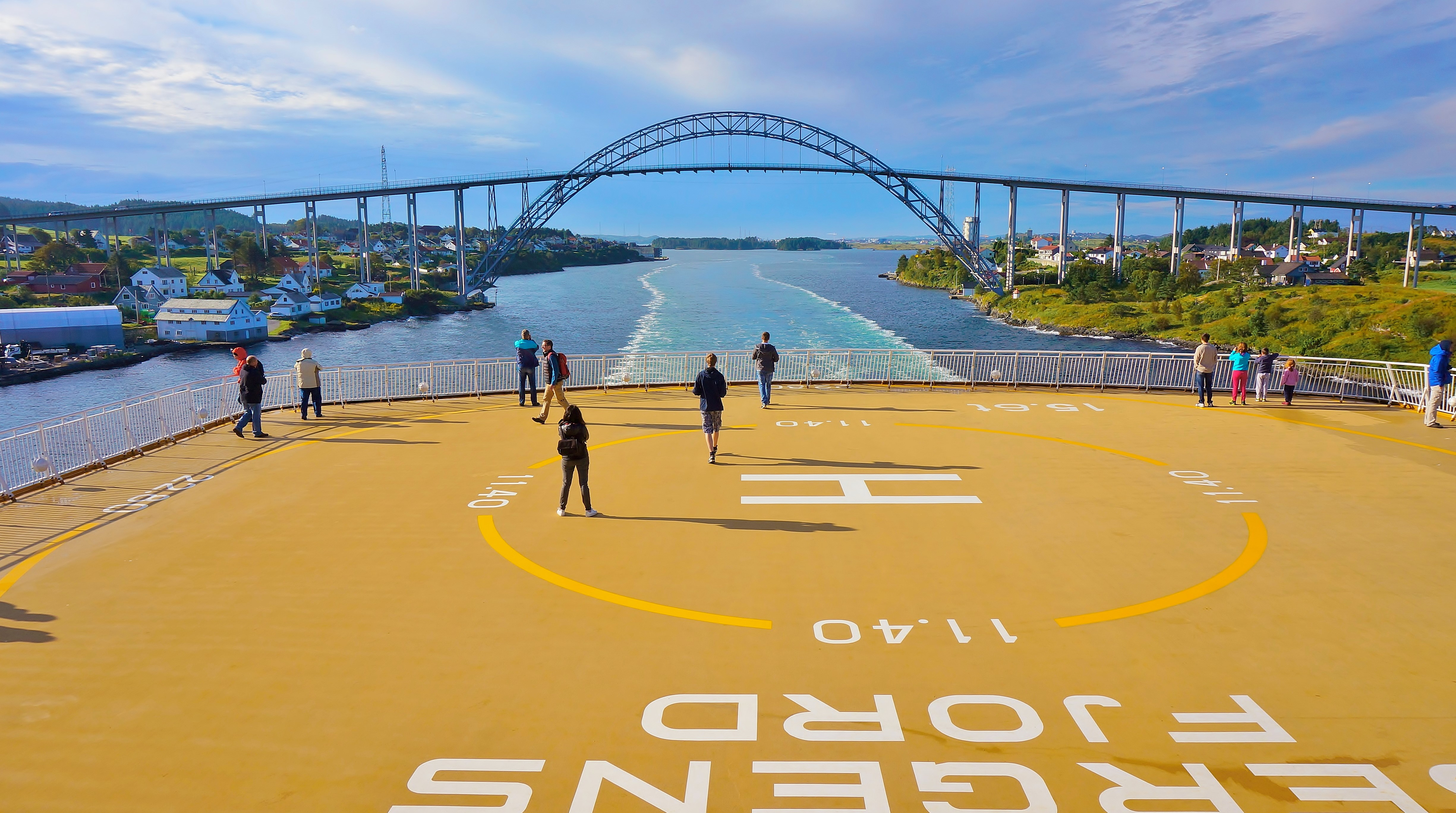 Brücke über den Karmsund Fähre Hirtshals- Bergen